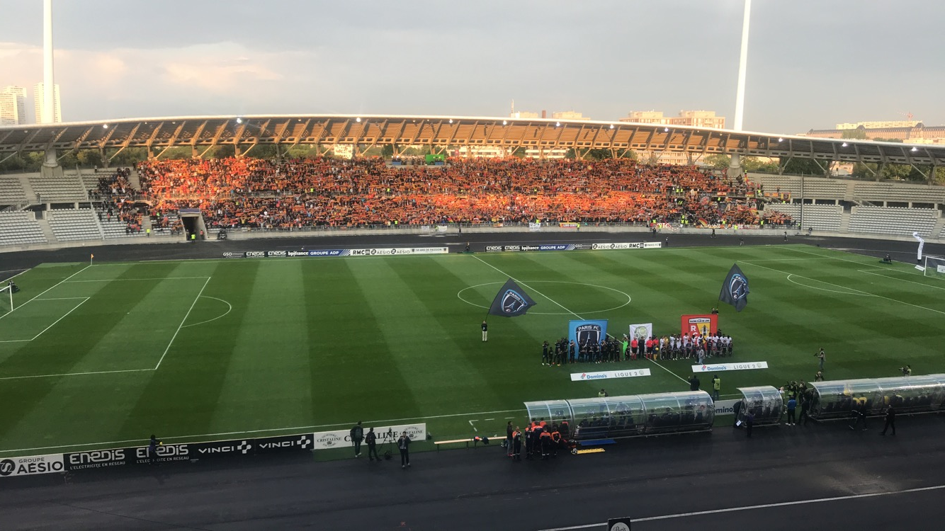 Paris FC-Lens Stade Charléty barrages